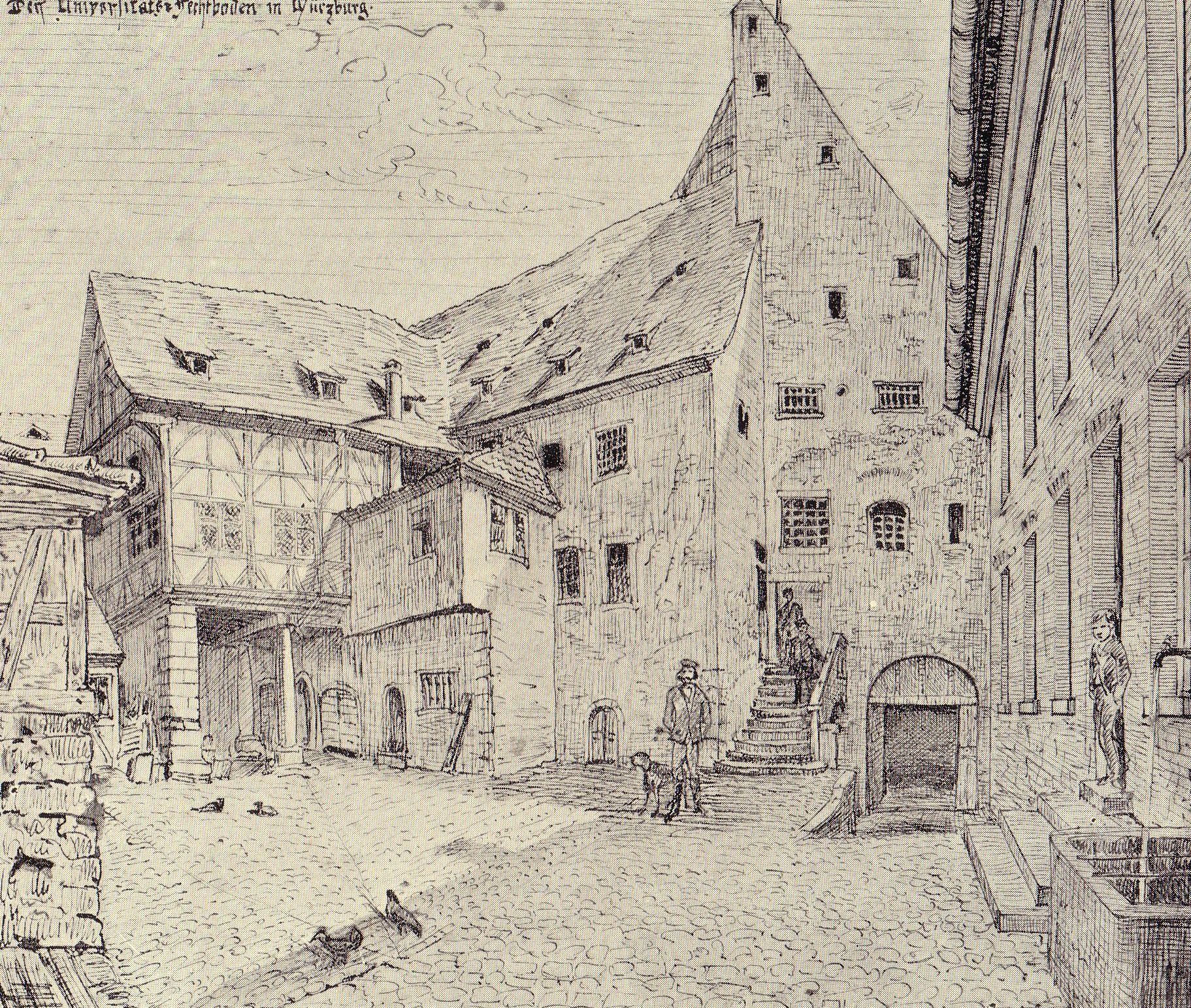 Tuschezeichnung des alten Universitätsfechtbodens in Würzburg